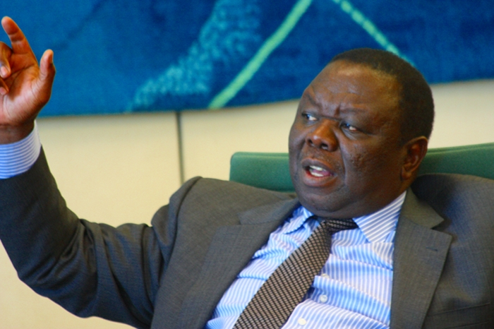 Morgan Tsvangirai 1